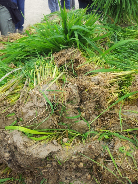 Garbes d'arròs per ser plantades a la Festa de la Plantada, festa tradicional de l’arròs que s’organitza a Deltebre